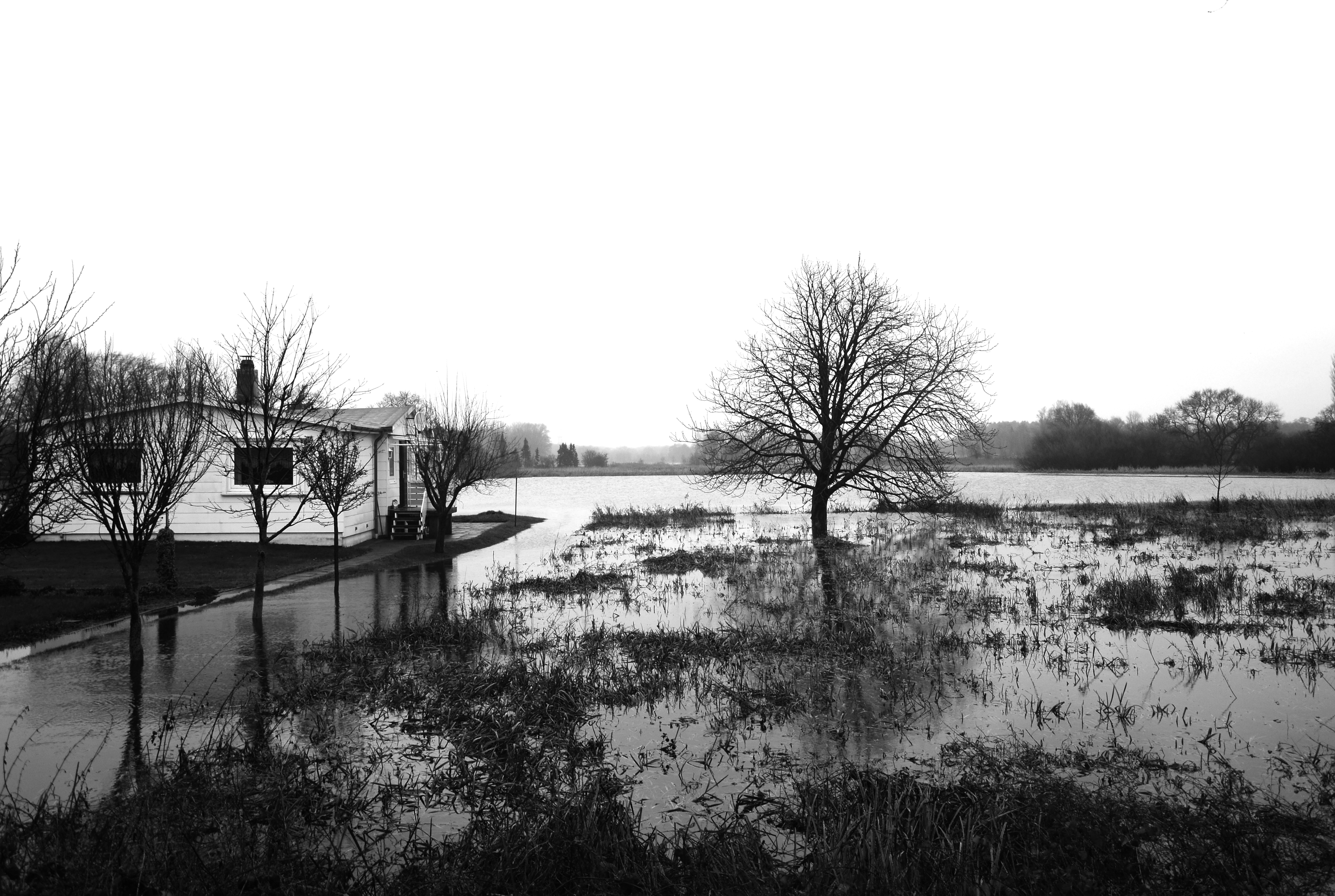 Die überflutete Bilsbek Niederung bei Prisdorf wie bei der Sturmflut 1962